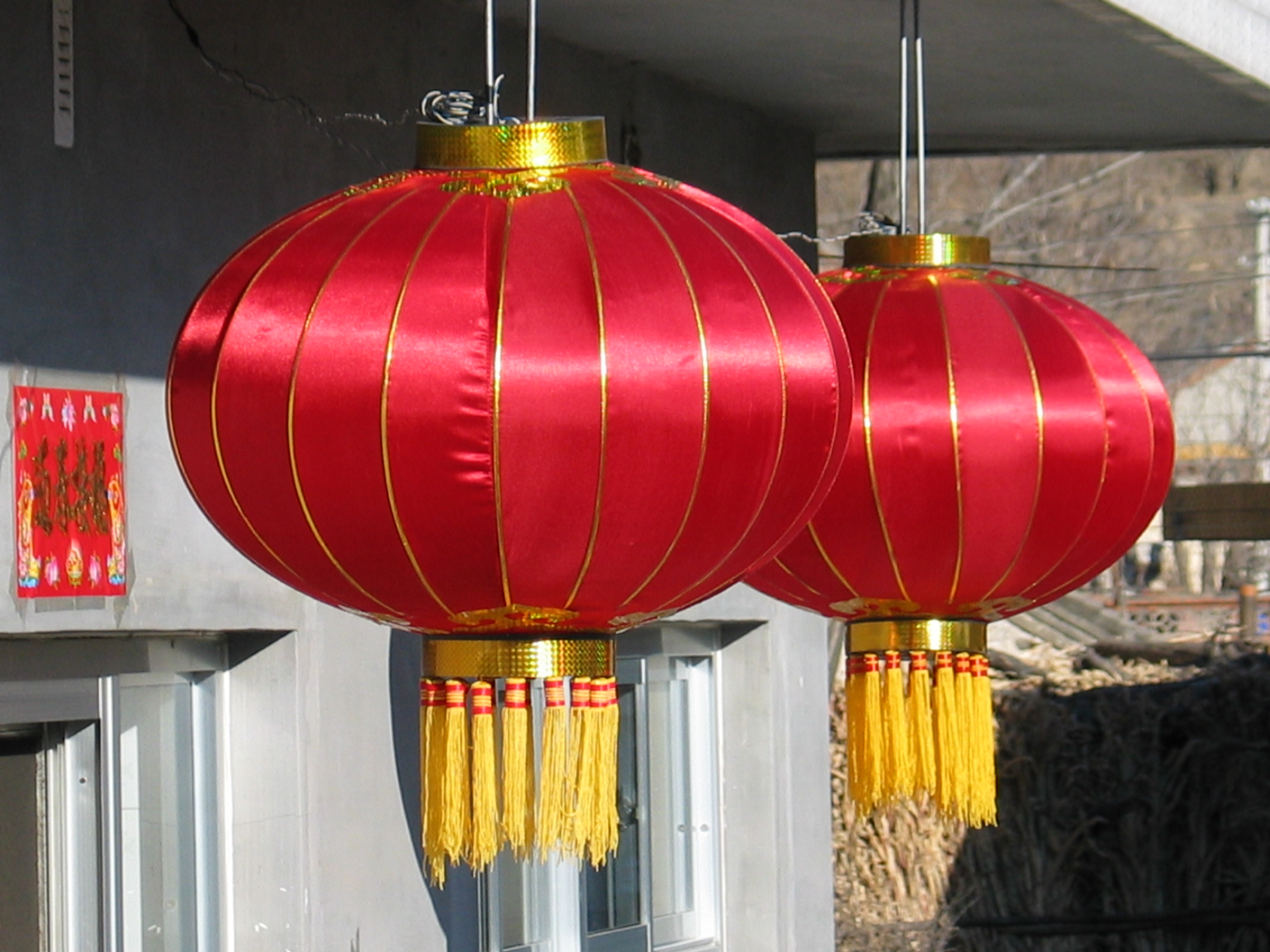 红红的灯笼高高挂